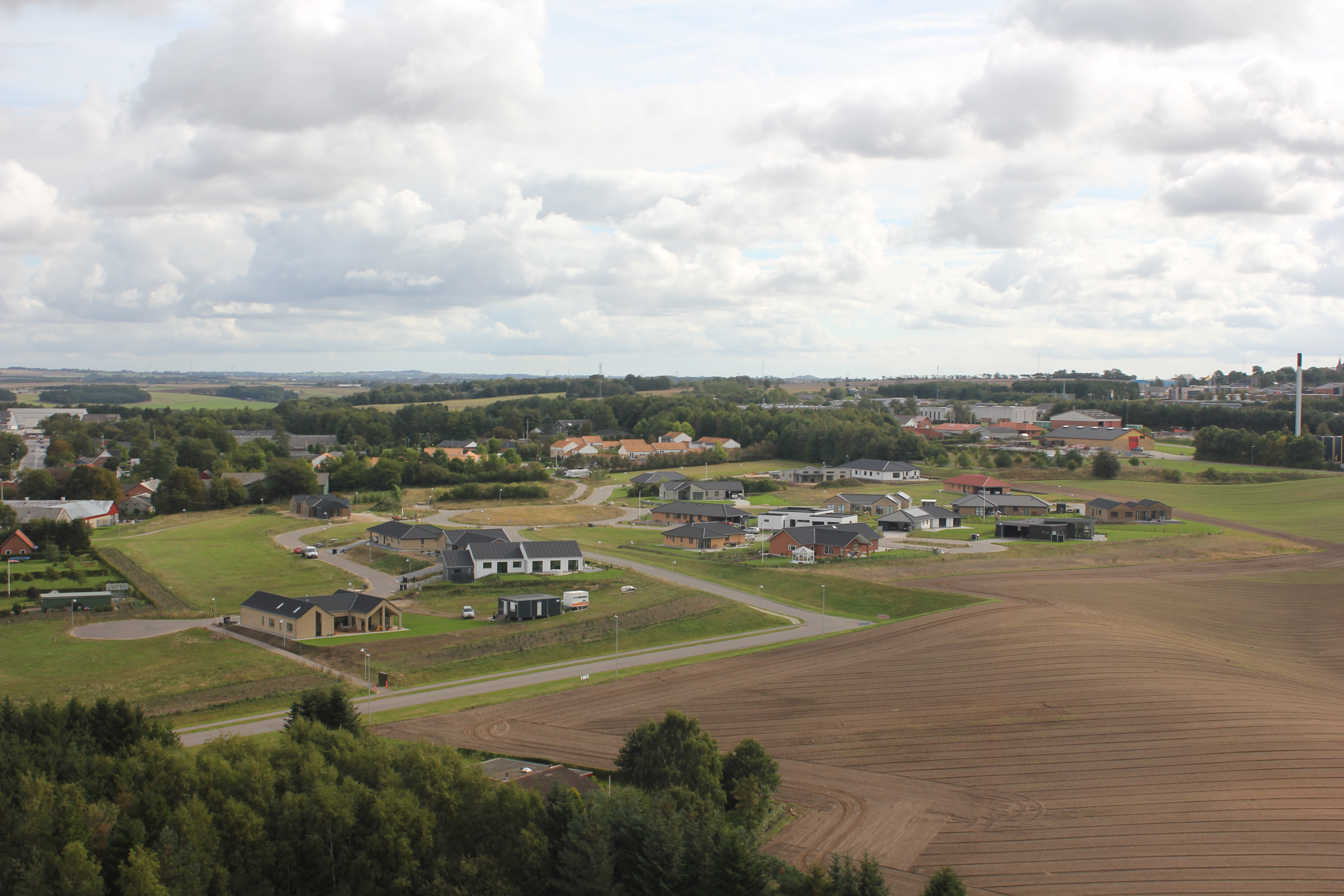 Nygårdsvænget i Hadsten 2013. Fotoet er taget fra en helikopter under landing. Fotoet er taget i sep. 2013.